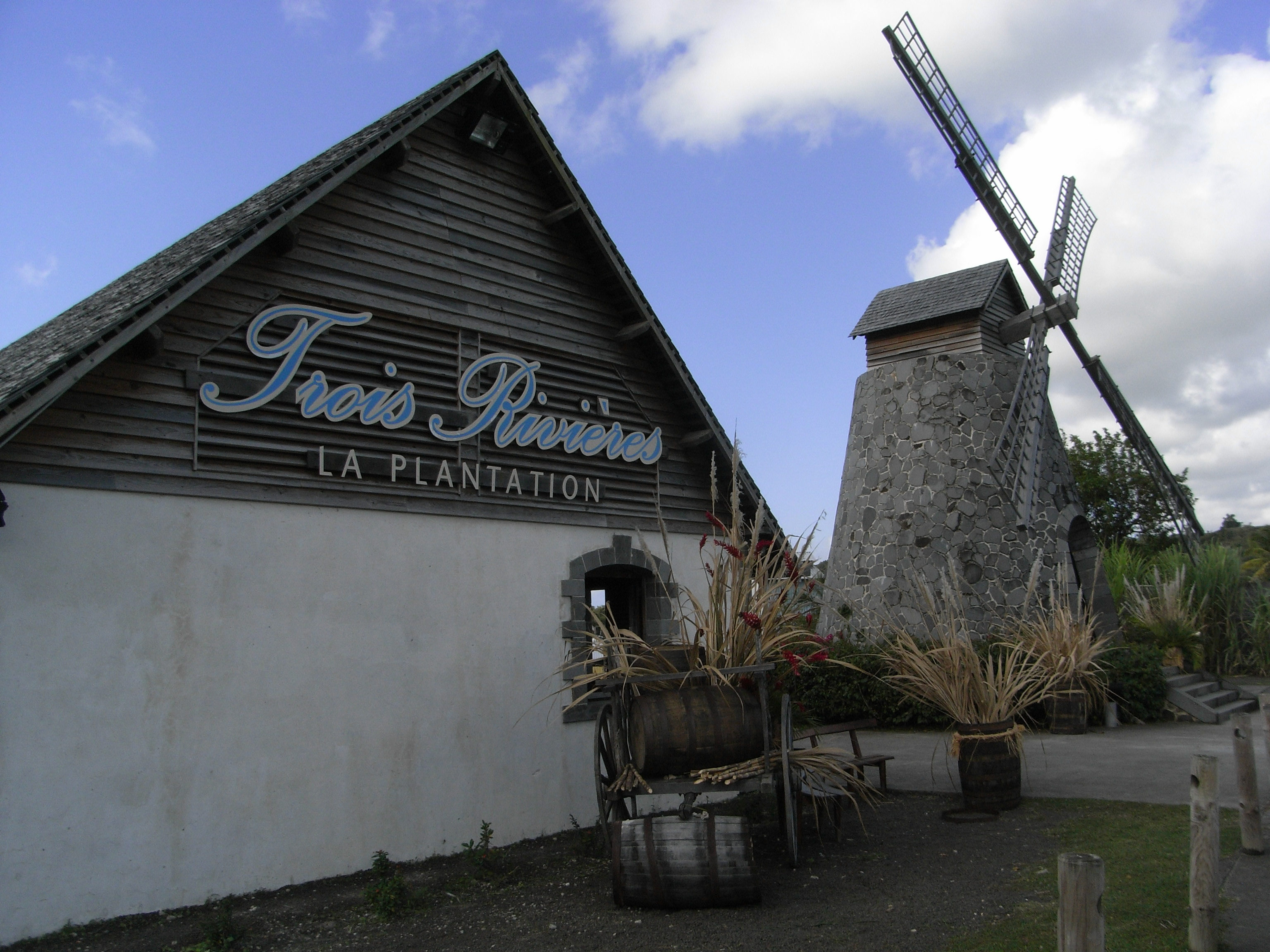 Propriété des rhums Trois Rivières à Sainte Luce en Martinique (France).